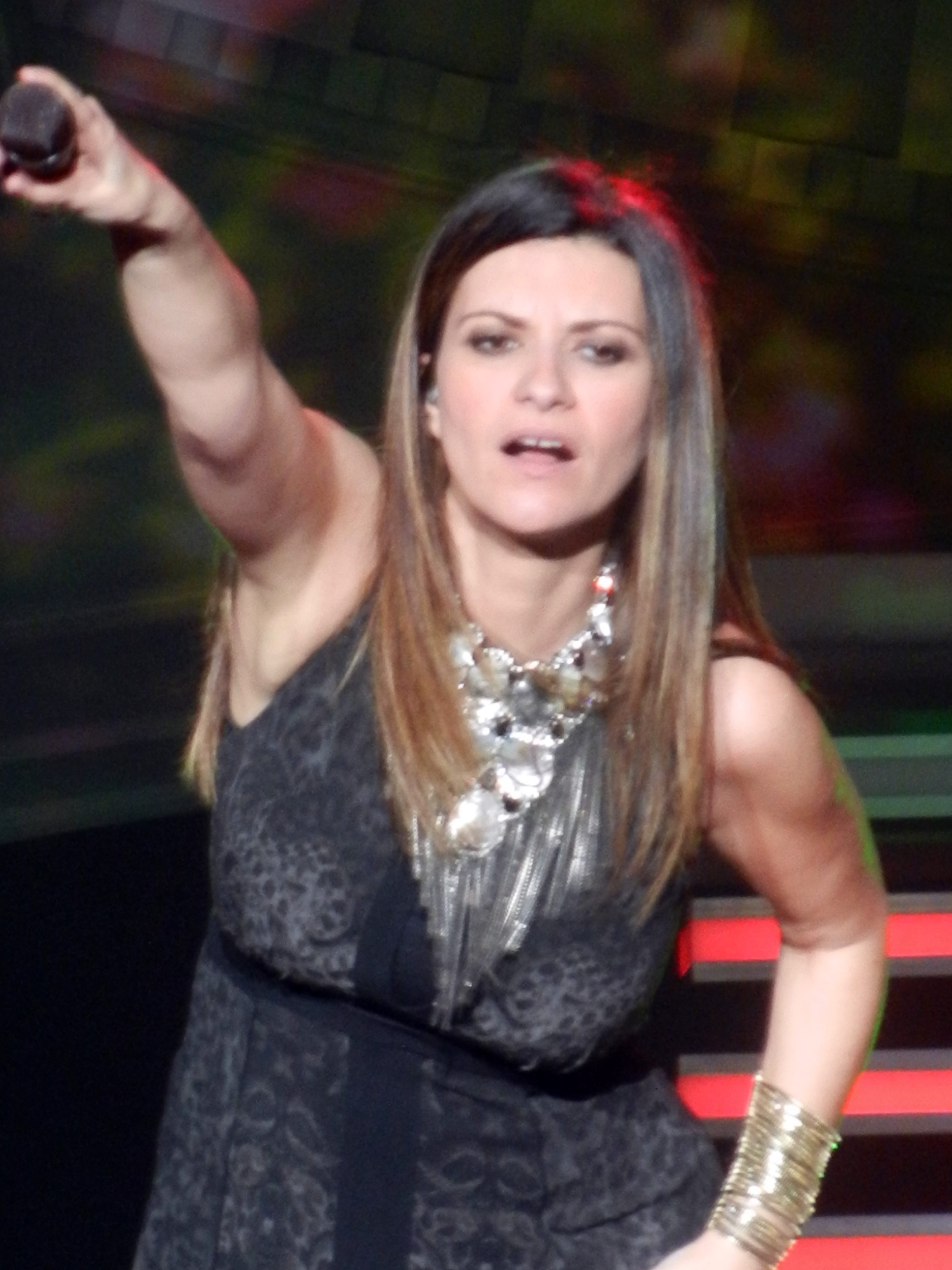 Laura Pausini 11 - Bercy - Avril 2012